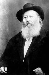 Ritratto di Antonio Ranieri